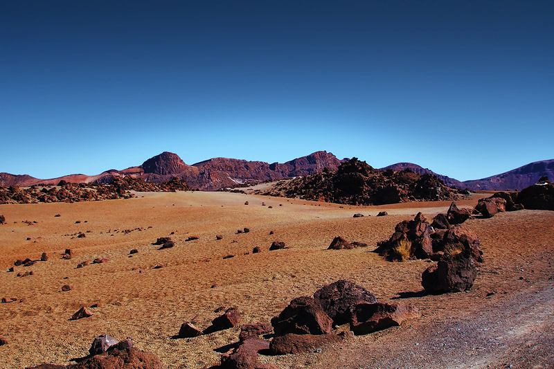 El Teide landscape